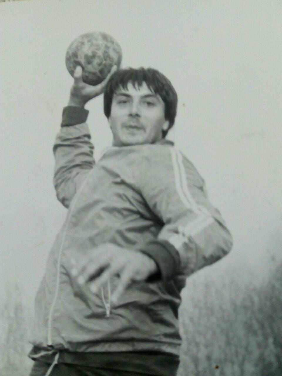 на тренировъчен лагер (коя година?)